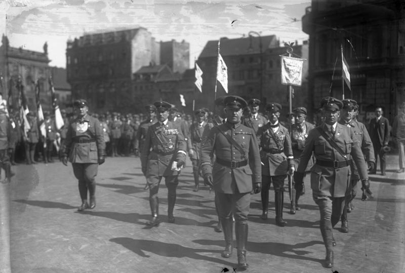 Stahlhelmführer Duesterberg kandidiert für die kommende Reichspräsidentenwahl ! Neueste Aufnahme Duesterbergs, der Kandidat der Deutschnationalen und des Stahlhelms für die Präsidentenwahl.